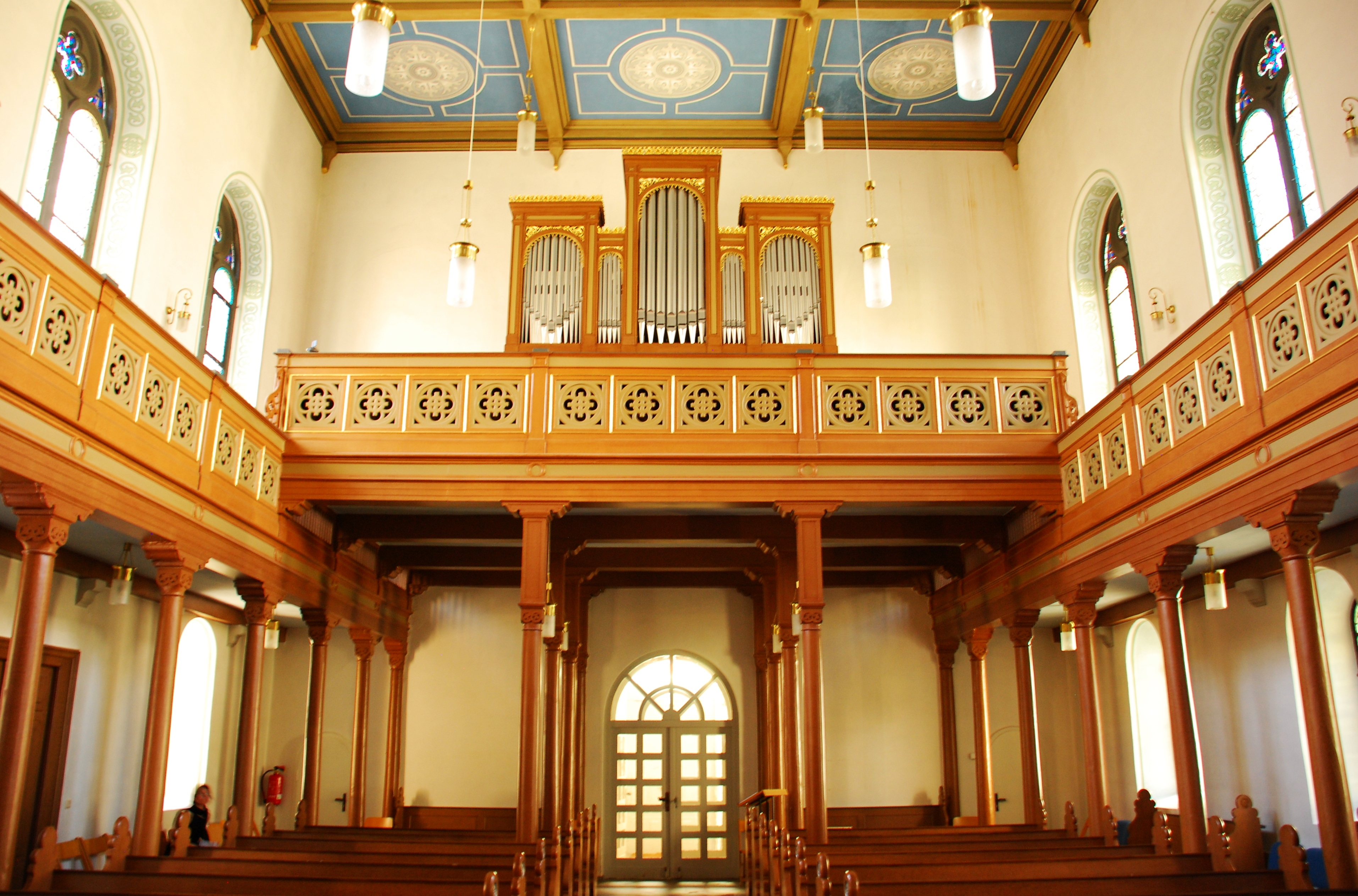 Empore der evangelischen Kirche in Sankt Goarshausen, Rhein-Lahn-Kreis, Rheinland-Pfalz. Als Denkmal im nachrichtlichen Verzeichnis der Kulturdenkmäler Rhein-Lahn-Kreis aufgeführt.